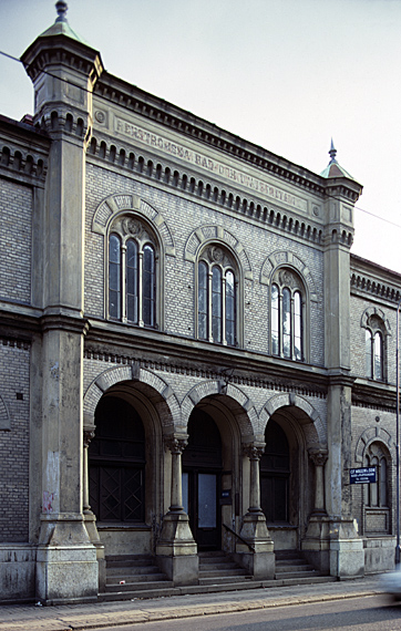 Entrén på Södra Allégatan. Motiv: Hagabadet Nyckelord: Byggnadsminnen, Riksintressen Kategori: Badhus, Stadsmiljö Entrén på Södra Allégatan.